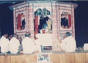 பிரித் கொட்டுவ - இலங்கை பௌத்த மக்களின் மத அனுஸ்டான மரபு முறைகளில் ஒன்று. பிரித் எனப்படும் வேதம் ஓதப்படும் போது அமைக்கப்படும் விசேட அலங்காரக்கூடு. இதற்குள் அமர்ந்த படியே பௌத்த மத குருமார் வேதம் ஓதுவர்.